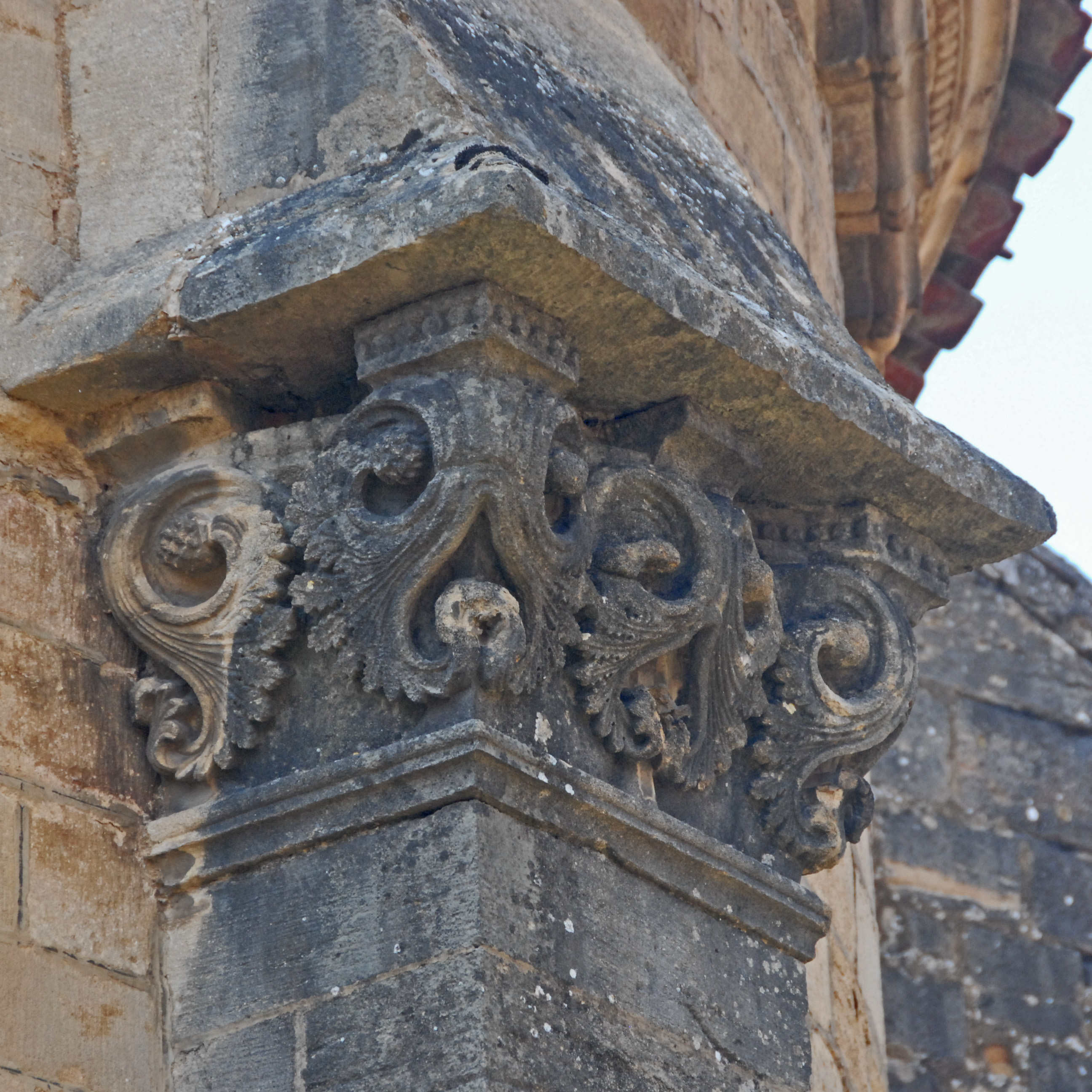 St-Hilaire de Semur-en-Brionnais, Strebepfeilerkopf Chorapsis